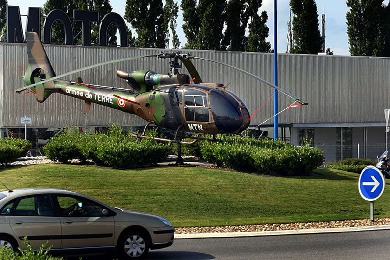 Rond point surmonté d'un hélicoptère type gazelle situé à l'entrée Nord de la ville de Montauban. Giratoire dédié à la mémoire de Caroline Aigle